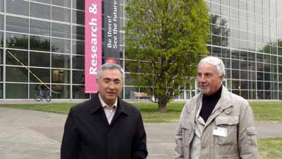 First presentation took place in hall IFM-GEOMAR (Leibniz Institute of marine investigations and Kiev University)